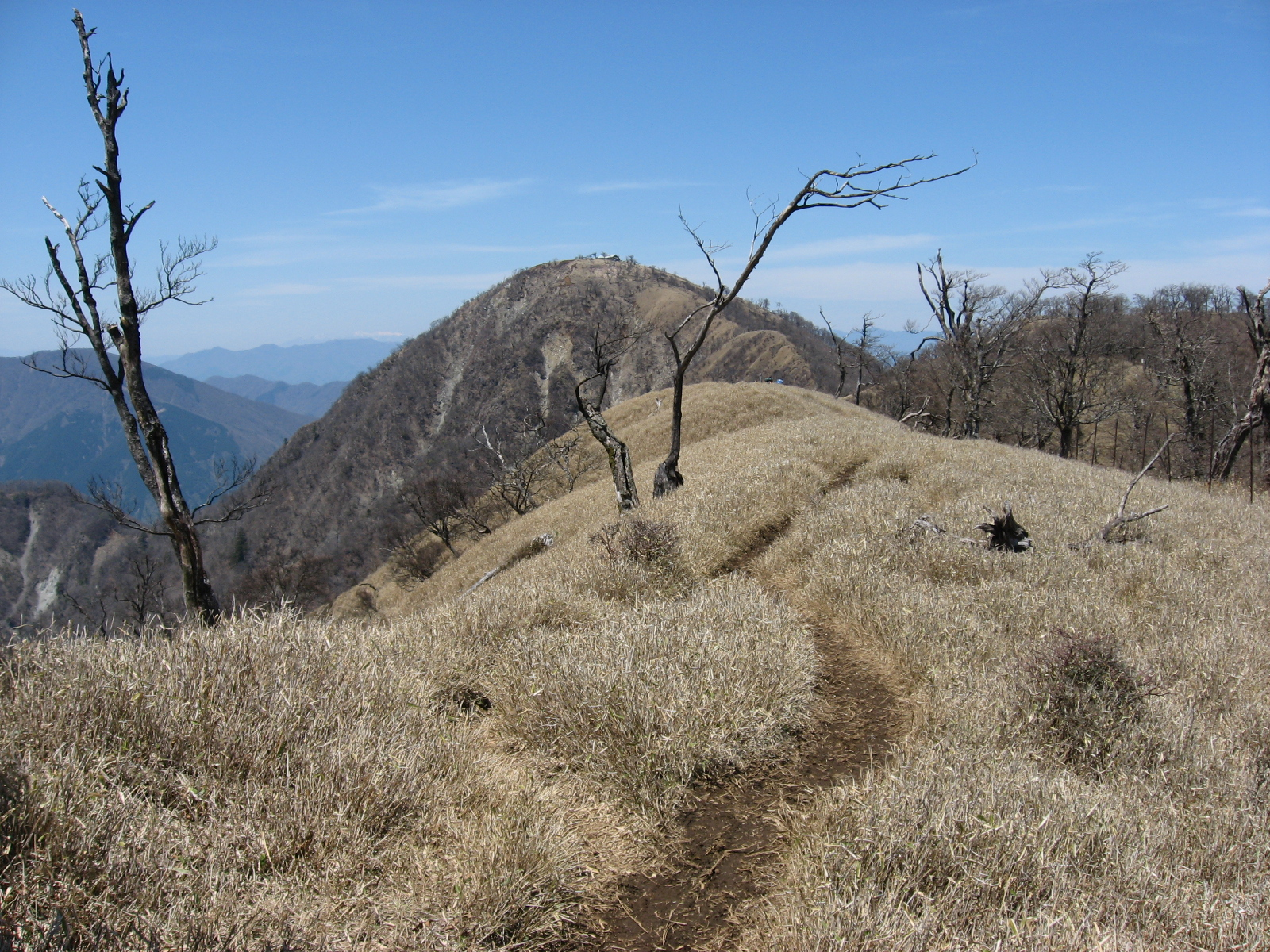 棚沢ノ頭付近の尾根道